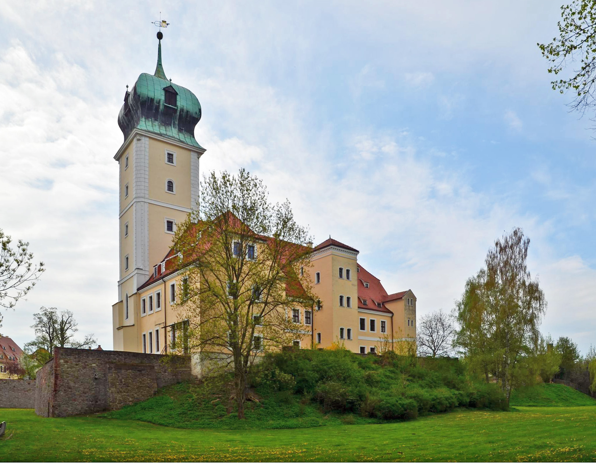 Die Nordseite des Barockschlosses Delitzsch